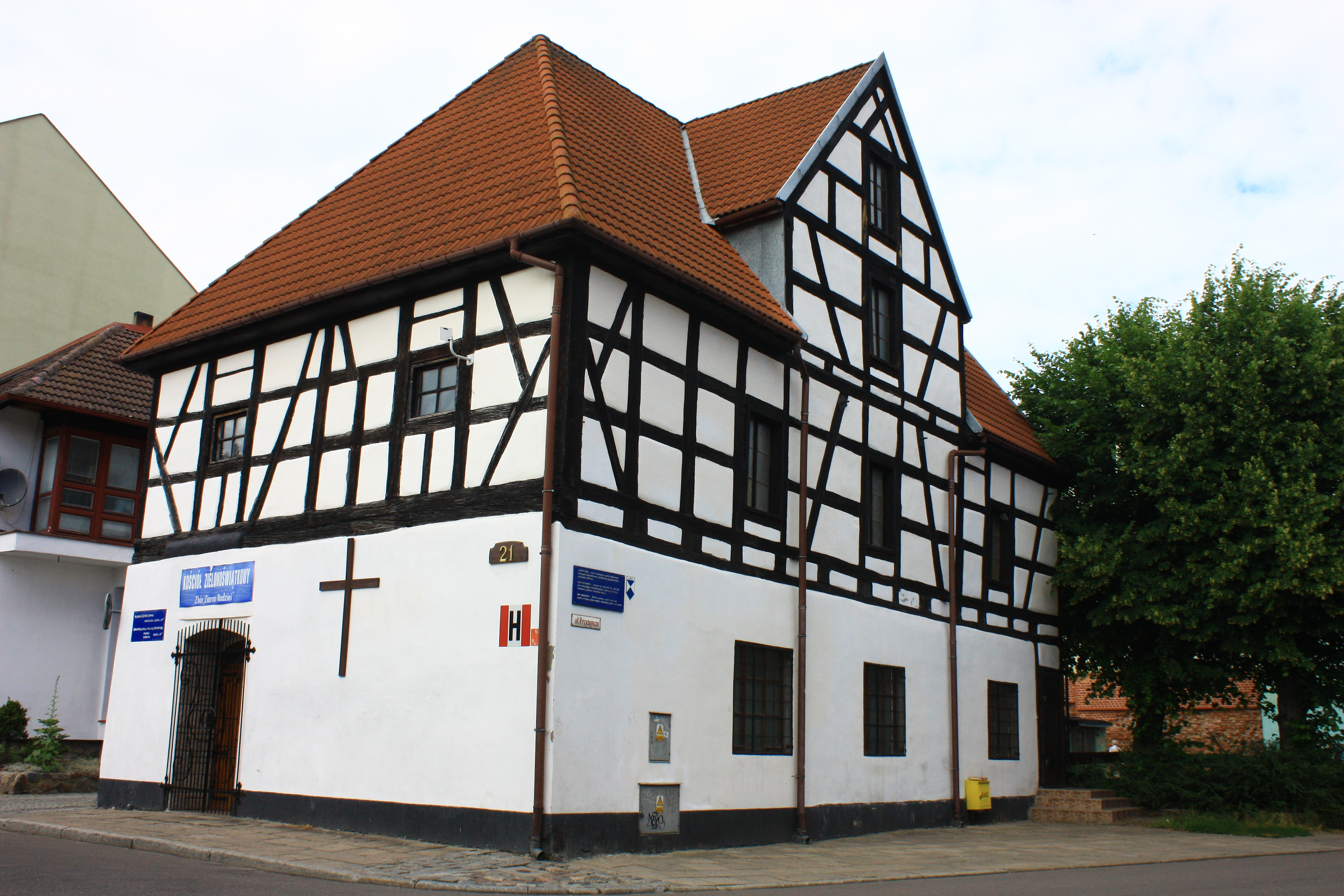 Lębork, spichlerz solny, ob. zbór zielonoświątkowców, XVII, XX